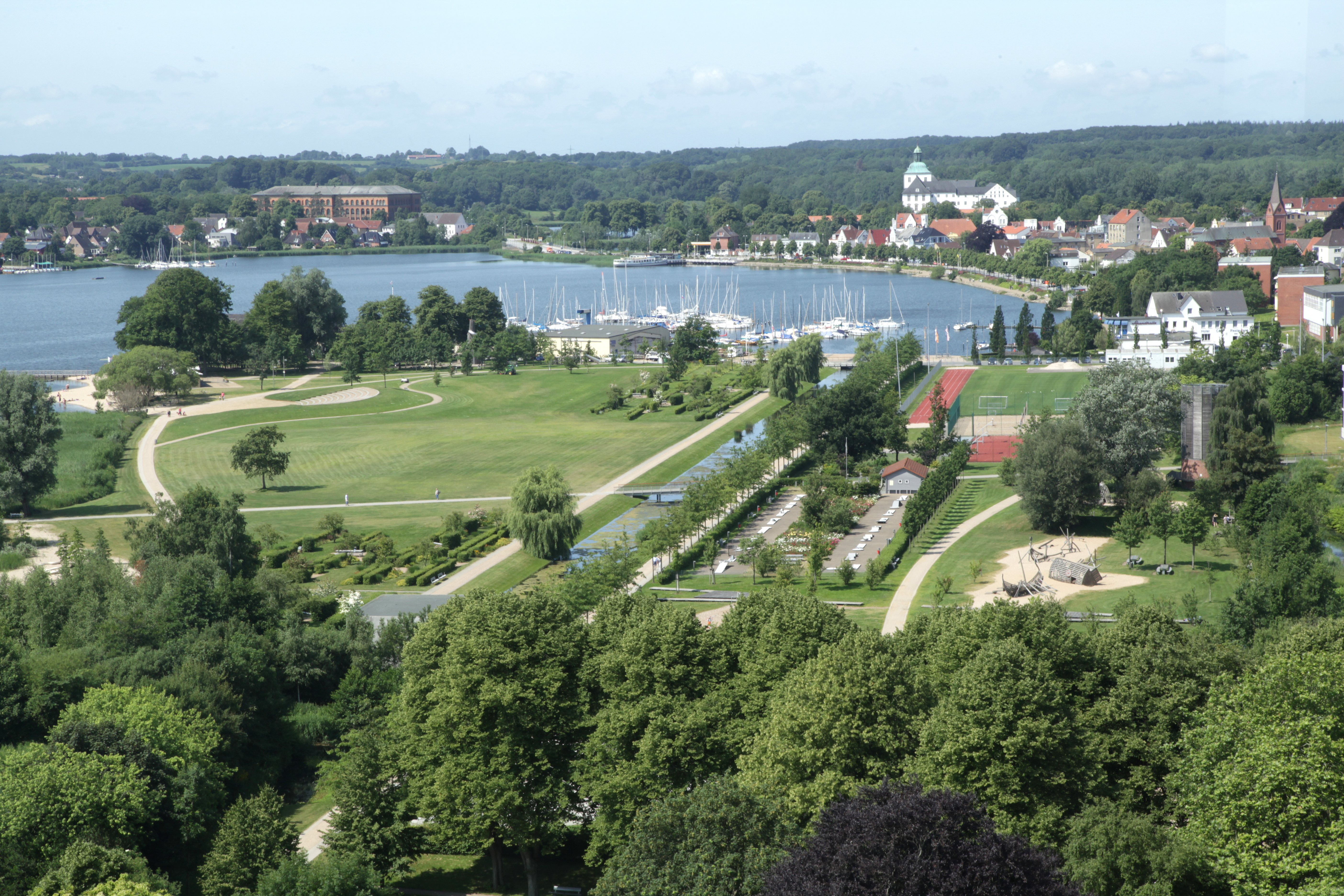 Blick vom Domturm (durch ein leider sehr dreckiges Fenster) zu den Königswiesen, den Clubhäfen und Schloss Gottorf in Schleswig